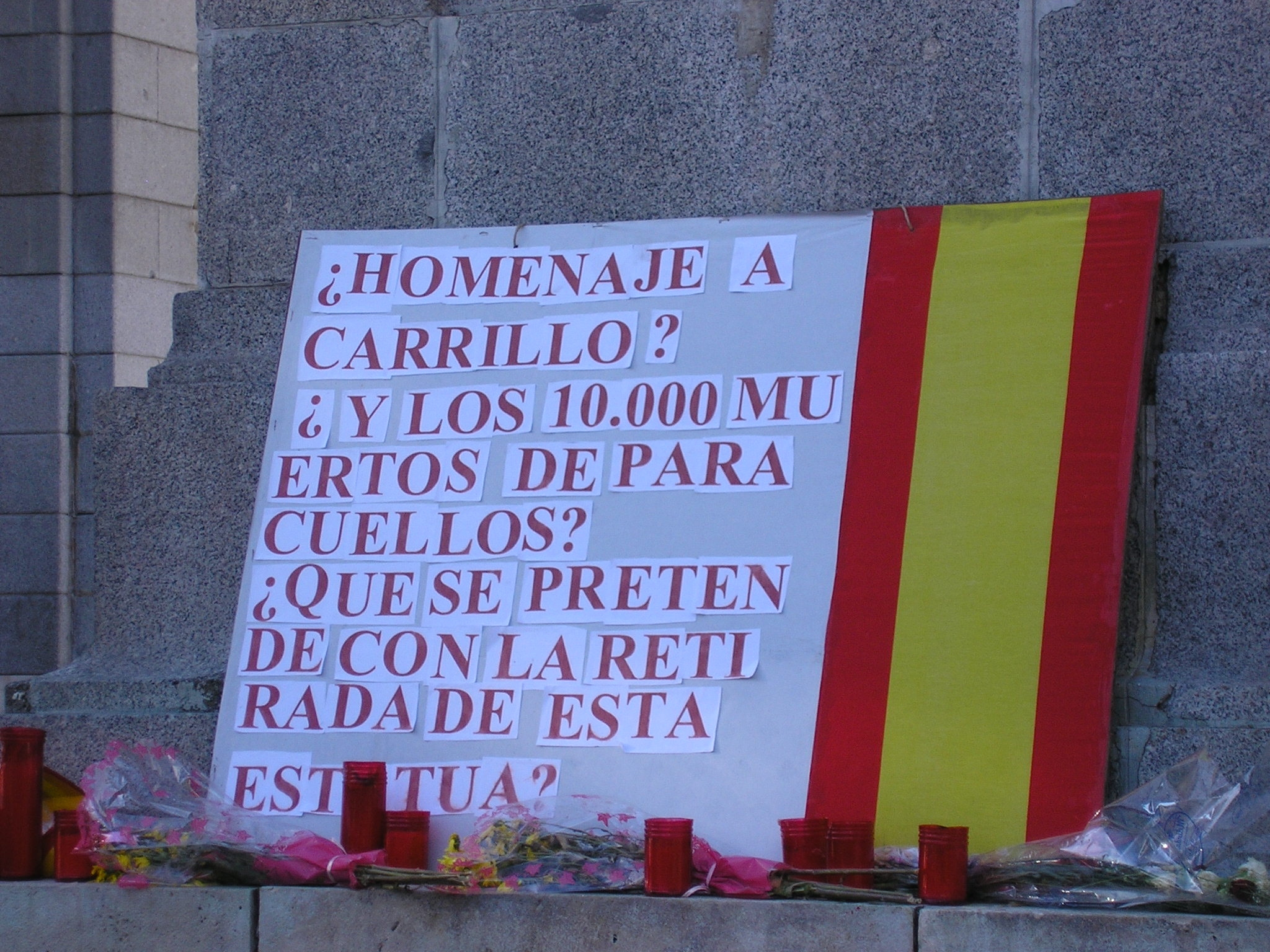 Poster aludiendo a la implicación de Santiago Carrillo en las matanzas de Paracuellos del Jarama en el pedestal de la estatua de Francisco Franco en Nuevos Ministerios tras su retirada.